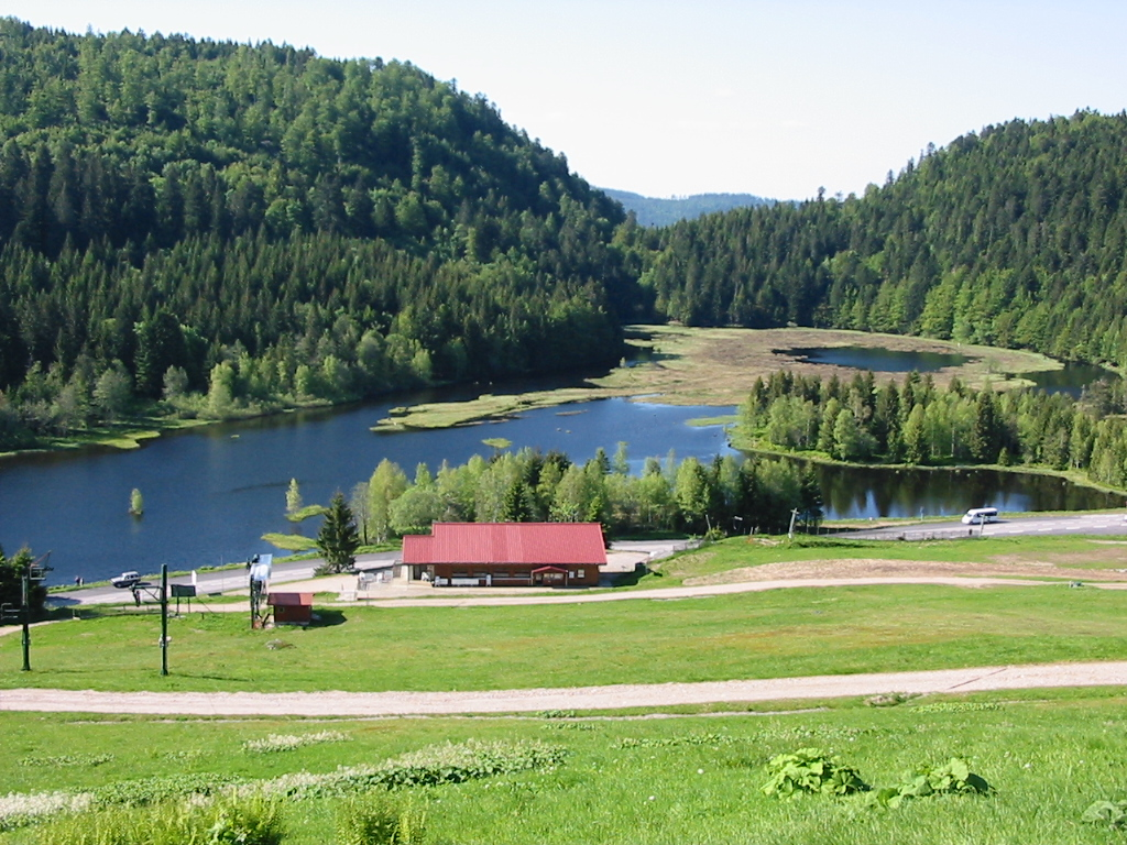 Lac de Lispach vu de la piste skiable Commune de La Bresse (88250), France Photographie personnelle prise le 8 juin 2006. Copyright © Christian Amet